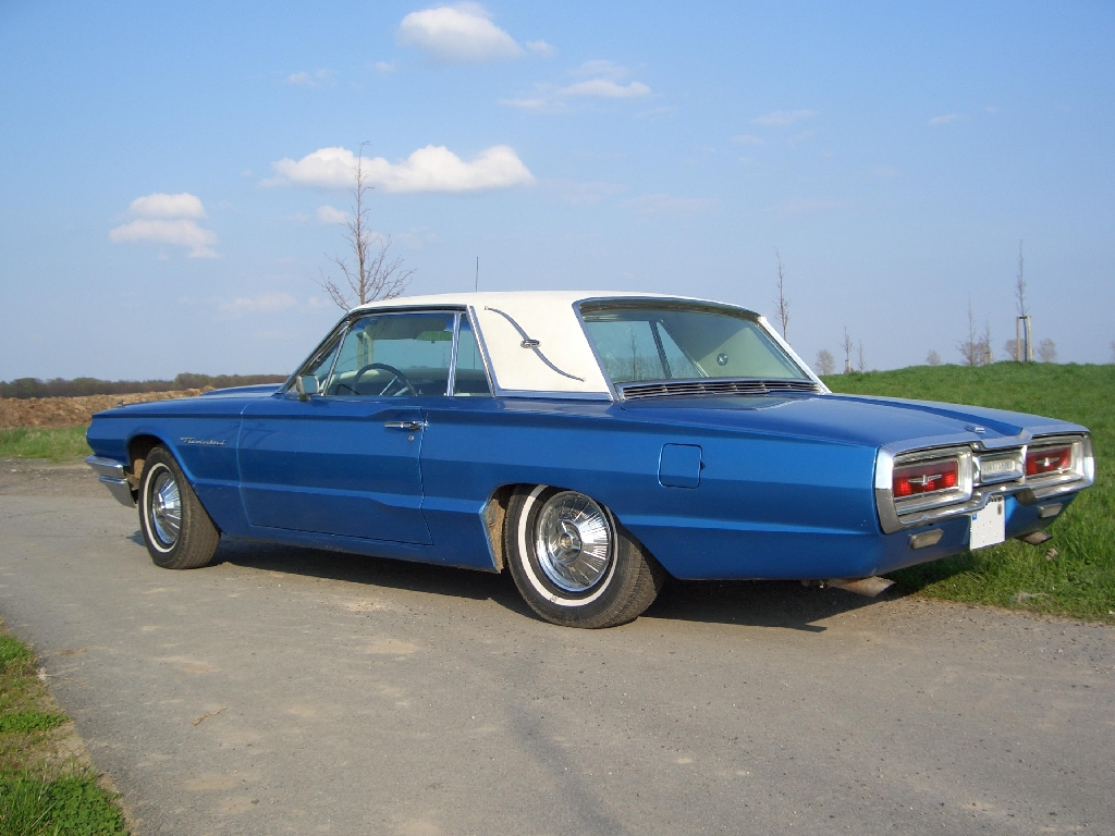 1964 Ford Thunderbird Landau